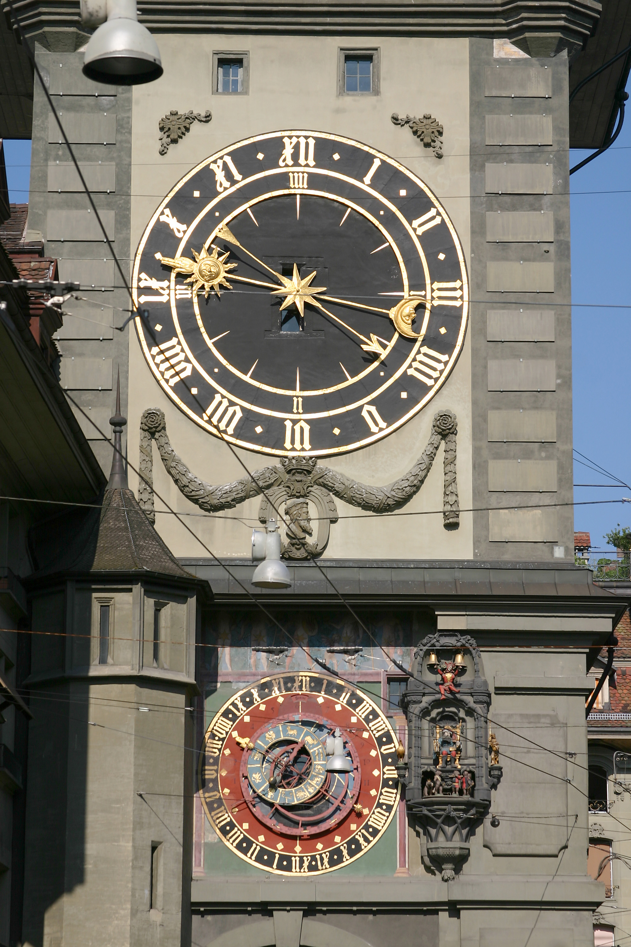 Zytglogge (Clocktower), Bern, Switzerland